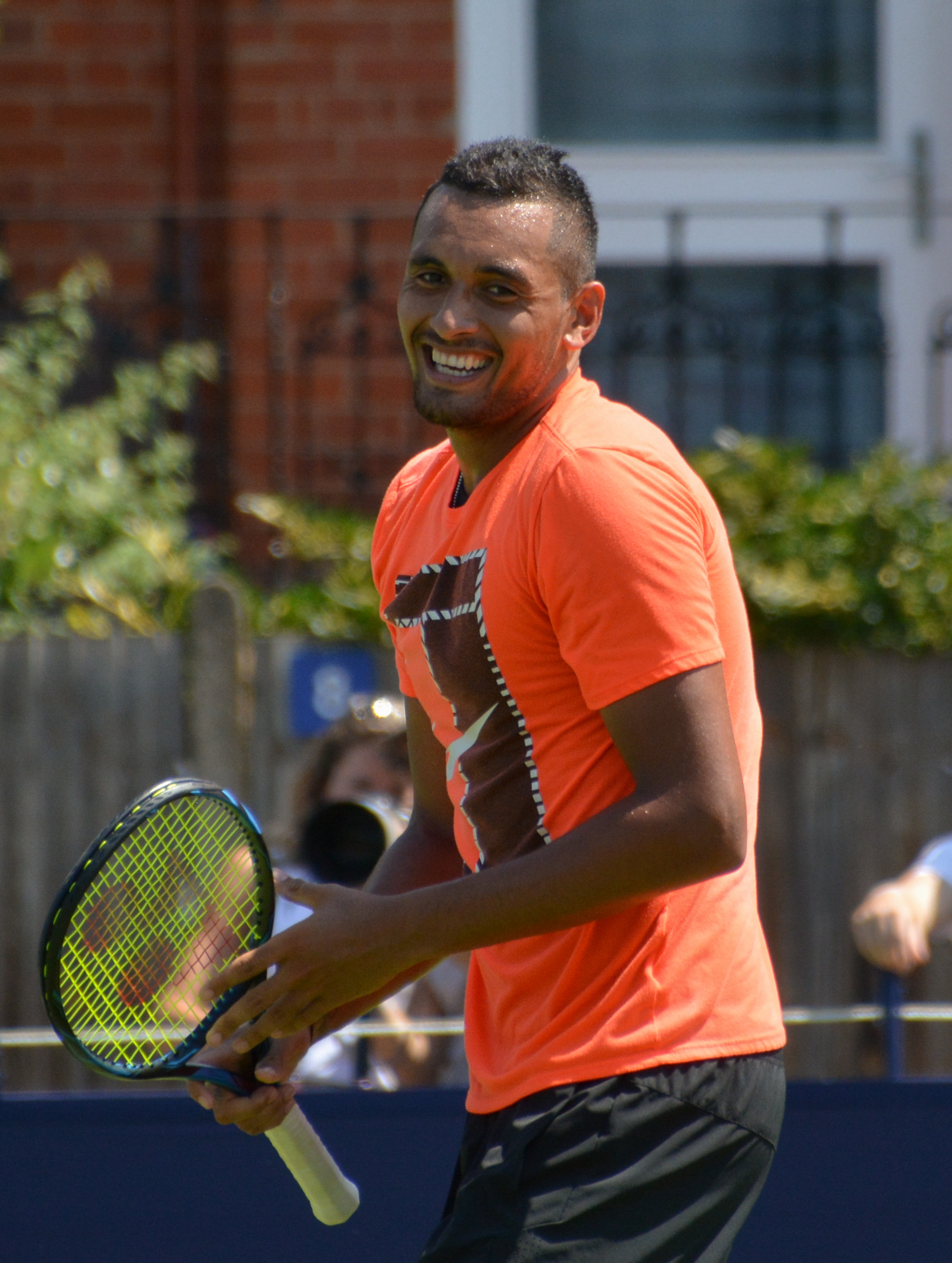 Nick Kyrgios